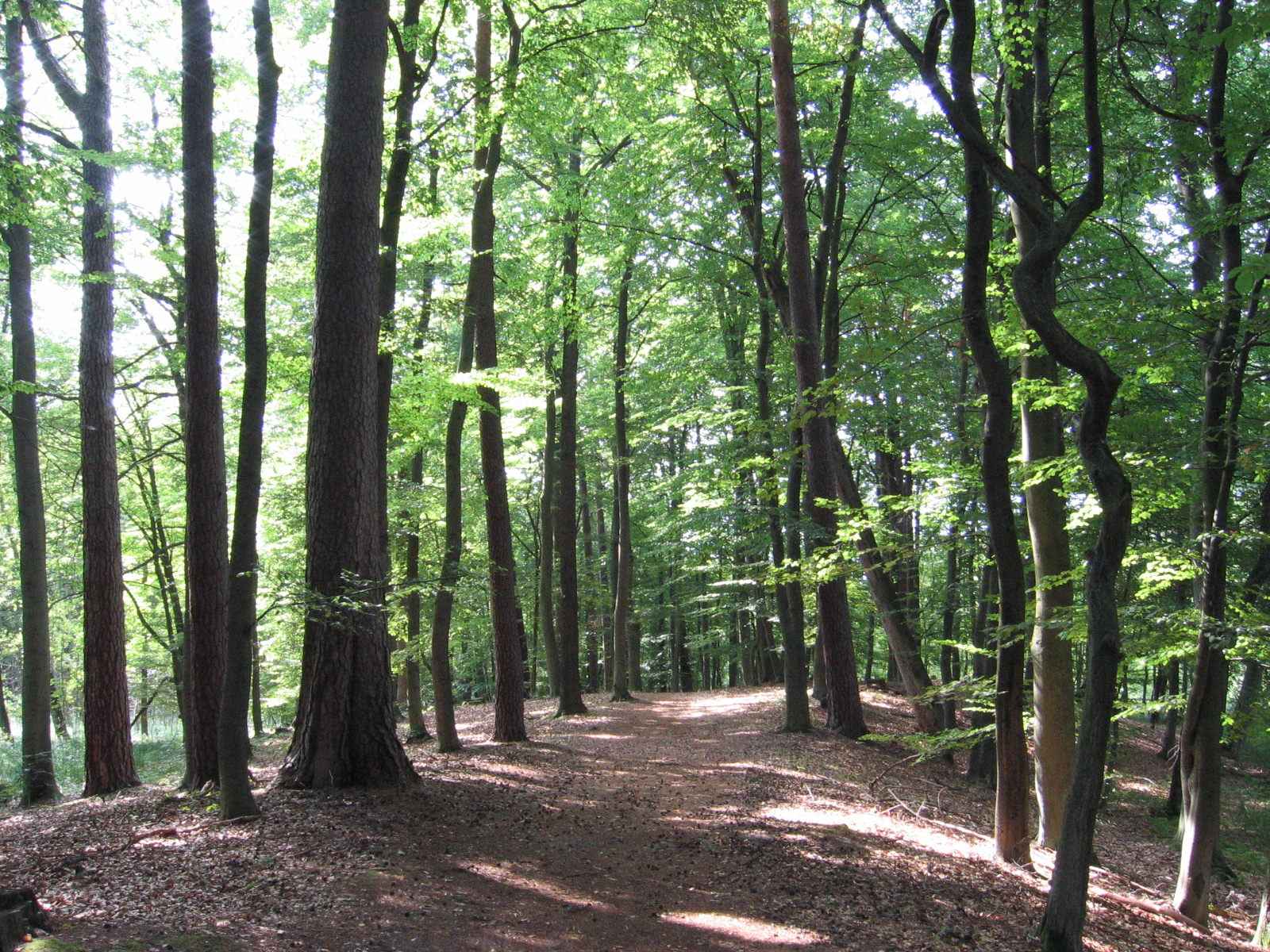 Park nad Bukówką.